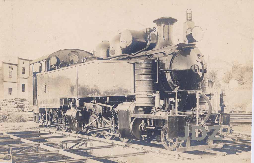 Die Lokomotiven der Baureihe kukHB VI waren schwere Nassdampf-Mallet-Tenderlokomotiven mit der Achsfolge (1'C)'C in Bosnischer Spurweite, die 1916 von Hendschel & Sohn für die k.u.k. Heeresbahn Süd. Die Jugoslawischen Staatsbahnen (JDŽ) bezeichneten die Nassdampf-Mallets als Baureihe JDŽ 91.